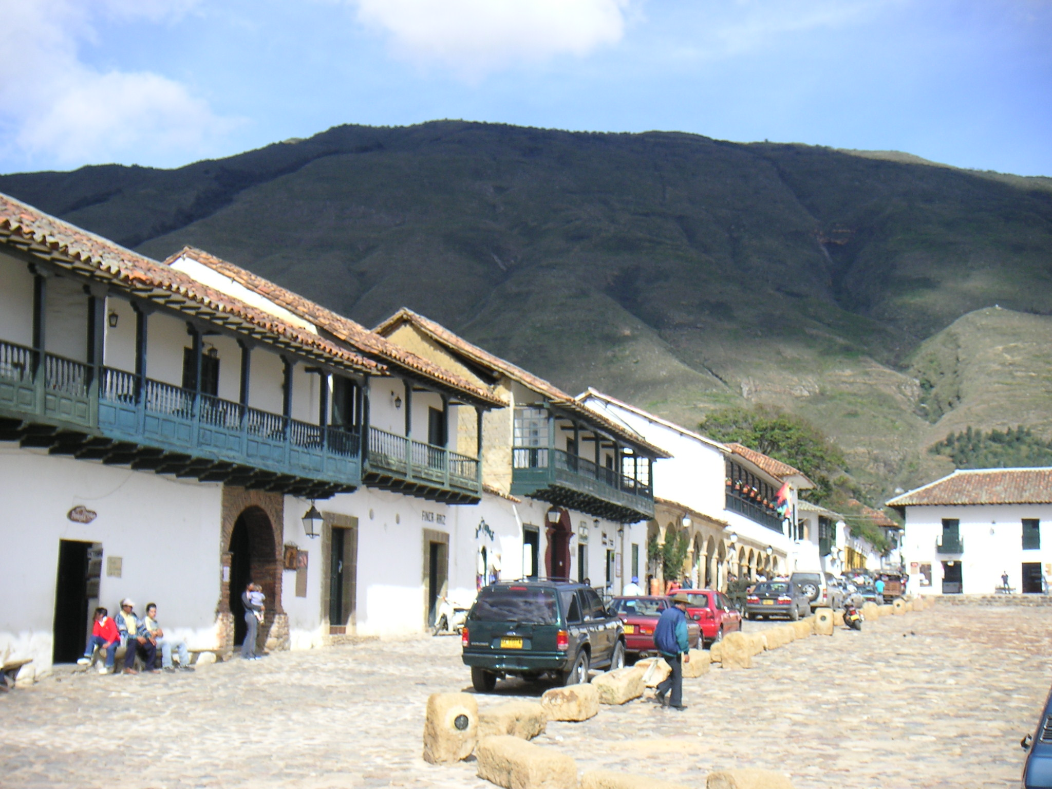 Description: Plaza Central, Villa de Leyva, Colombia Source: Louise Wolff (darina), June 2005